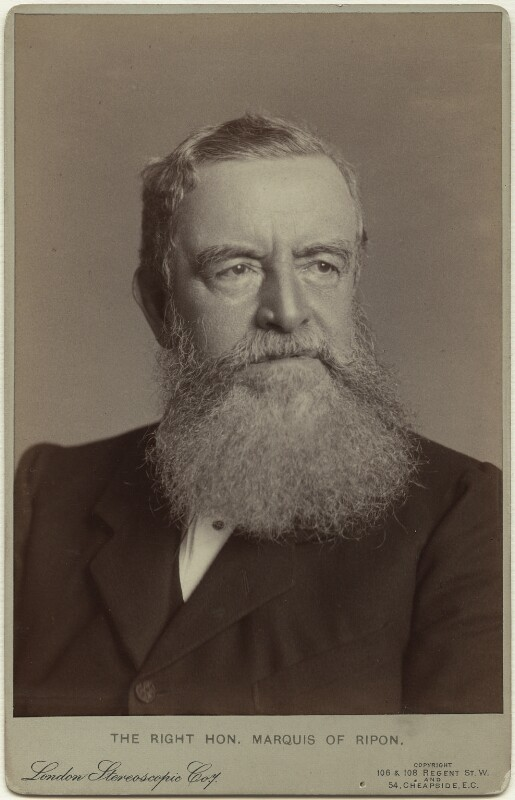 Lord Ripon